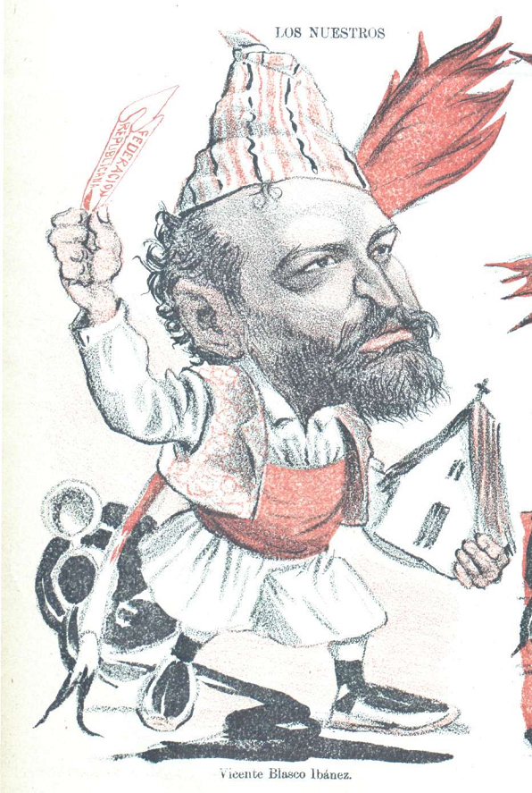 Caricatura.